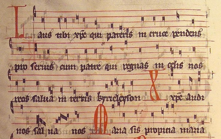 Antiphonarium Benedictinum (1400): Laus tibi, Christe, qui pateris, Hymnus am Karfreitag, Erstbeleg Salzburg um 1350